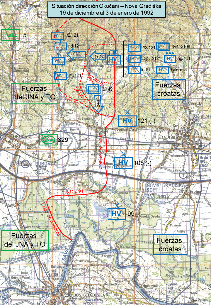 sobre la base de Martinić Jerčić, Natko (2014-12-11). «Oslobodilačke operacije hrvatskih snaga u Zapadnoj Slavoniji u jesen i zimu 1991./1992. godine» [Operaciones de liberación de las fuerzas croatas en Eslavonia occidental en el otoño y el invierno de 1991/1992]. Tesis doctoral (en croata) (University of Zagreb. Department of Croatian Studies.).